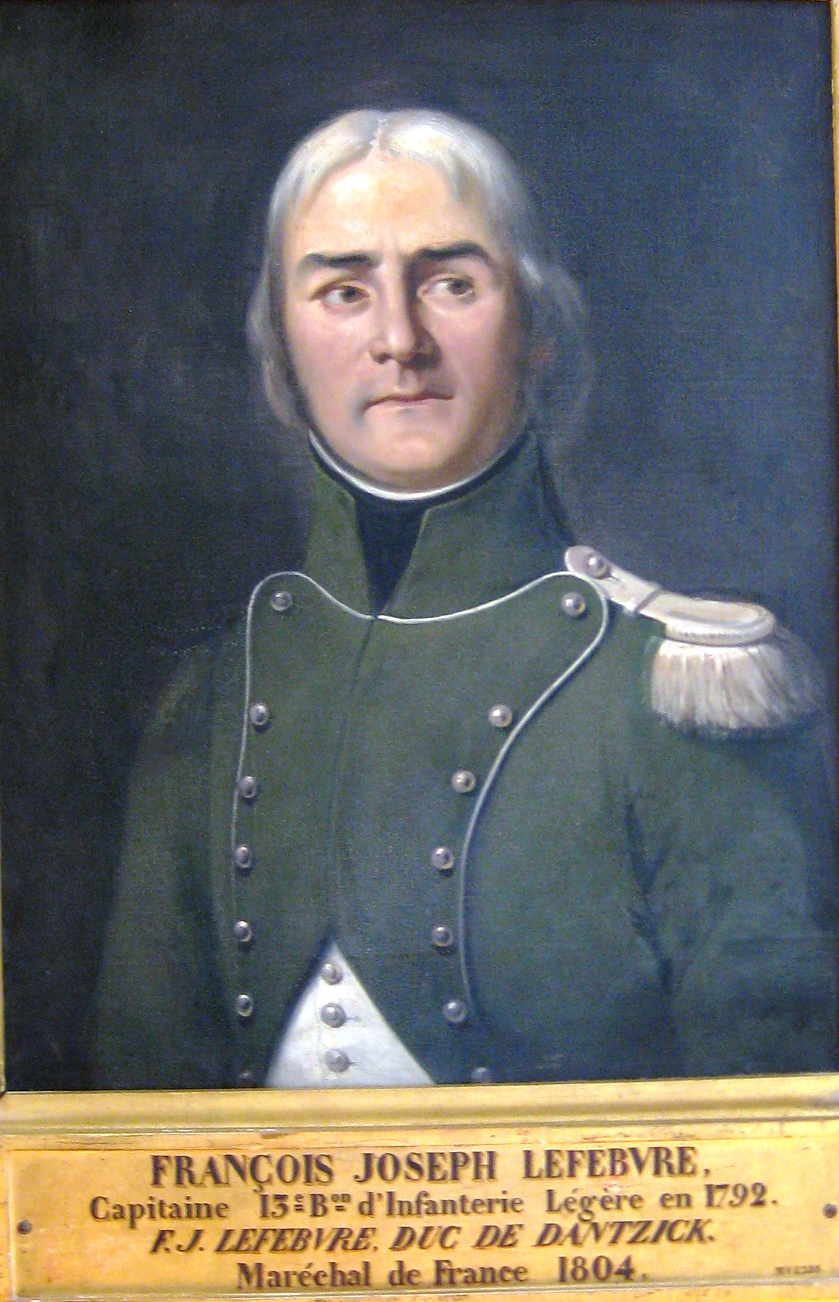 Dans la galerie des maréchaux de Versailles, Lefebvre qui a donné son nom à la rue et au boulevard du XV° arrondissement de Paris